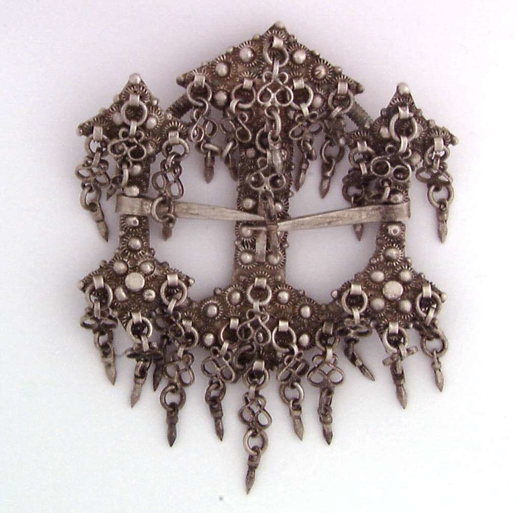 Byggkornring, hornring med kruser i filigran, hengende byggkorn og to teiner. Fra ukjent sted. Foto Anne-Lise Reinsfelt / Norsk Folkemuseum, NF.1921-0561.